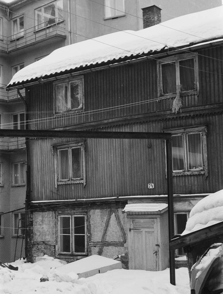 Tidligere Briskebyveien 74 (revet i 1970-årene), sett fra bakgråden. Foto: Kari Paulsen, fra Byhistorisk samling hos Oslo museum.